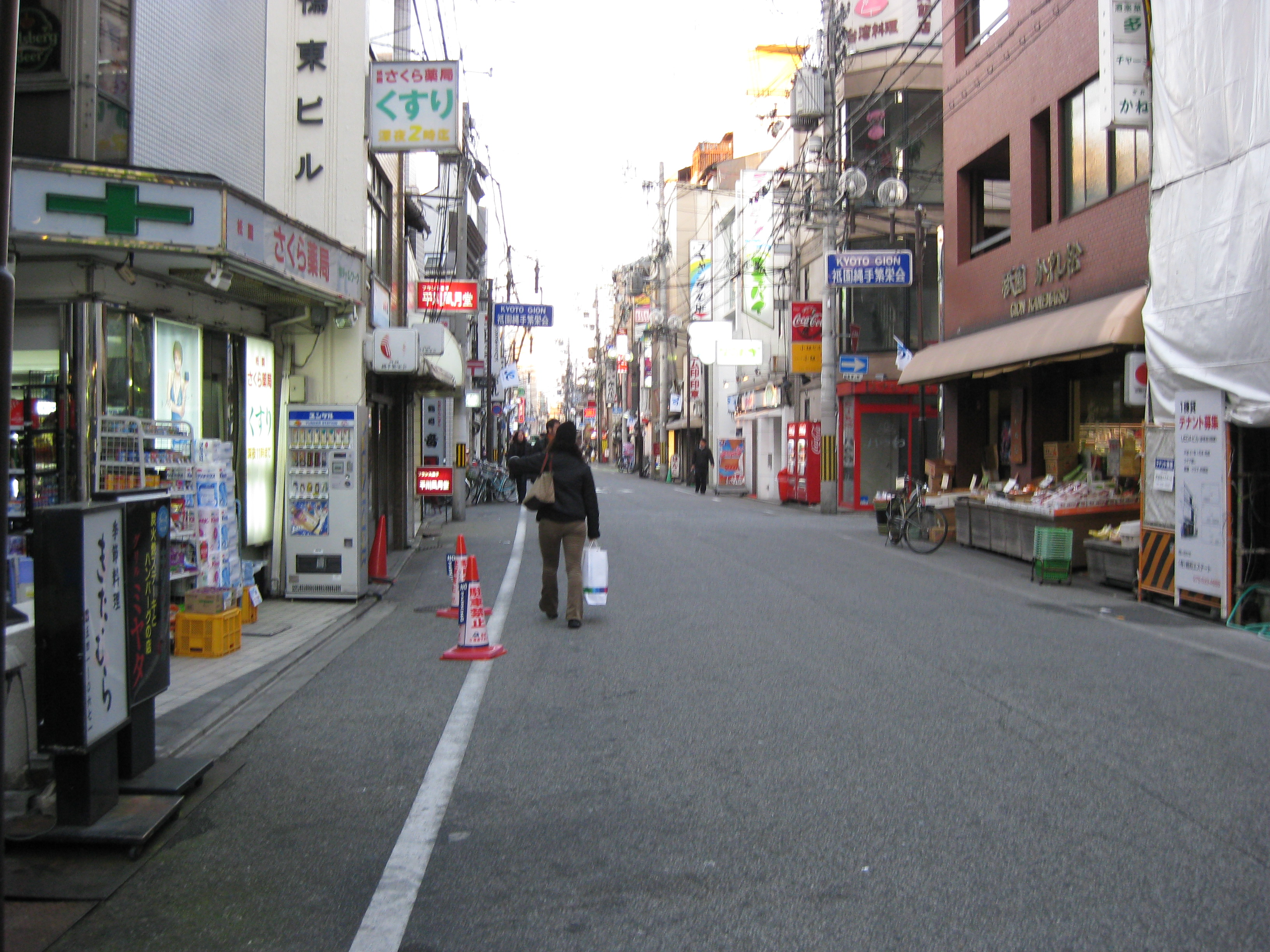 大和大路通（縄手通） 四条通付近から北方面